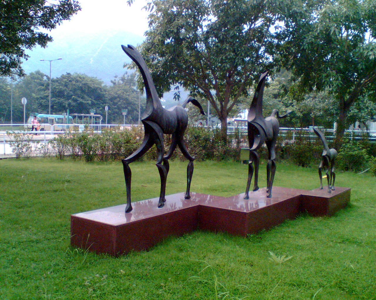 那打素醫院藝術雕像